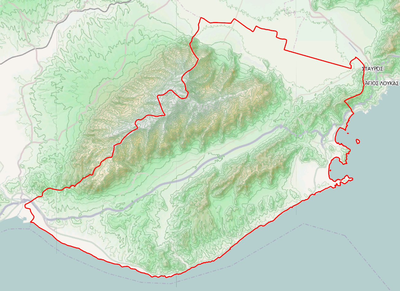 Τοπογραφικός χάρτης του Δήμου Παγγαίου.